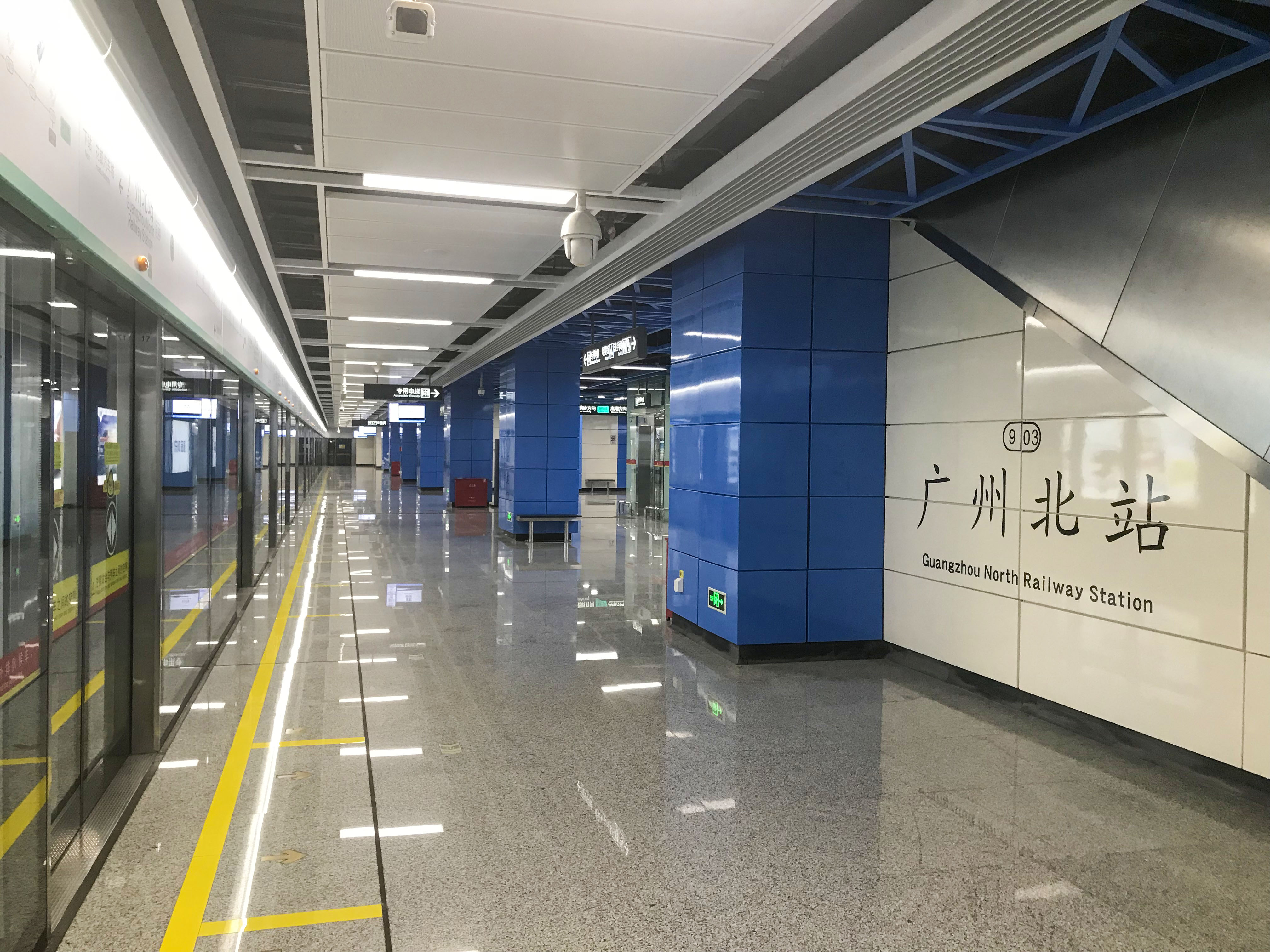 广州地铁广州北站